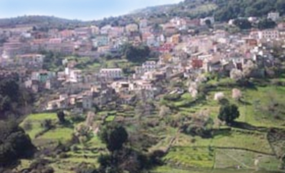 Gadjodillo OTRS #2006021110003041